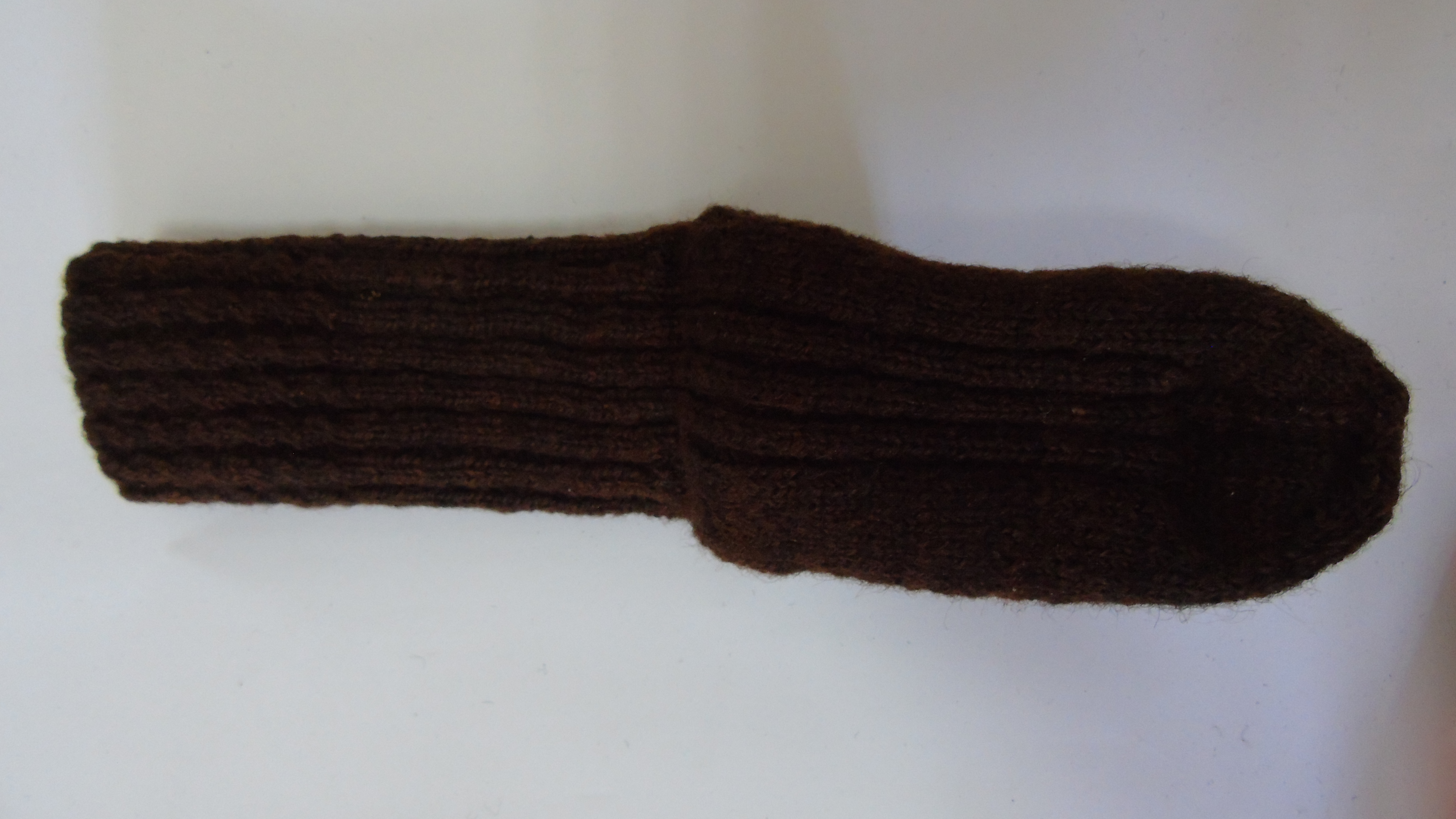 Српски (ћирилица): Мушке плетене вунене чарапе бојене у ораховину (из Збирке чарапа Музеја у Трстенику)